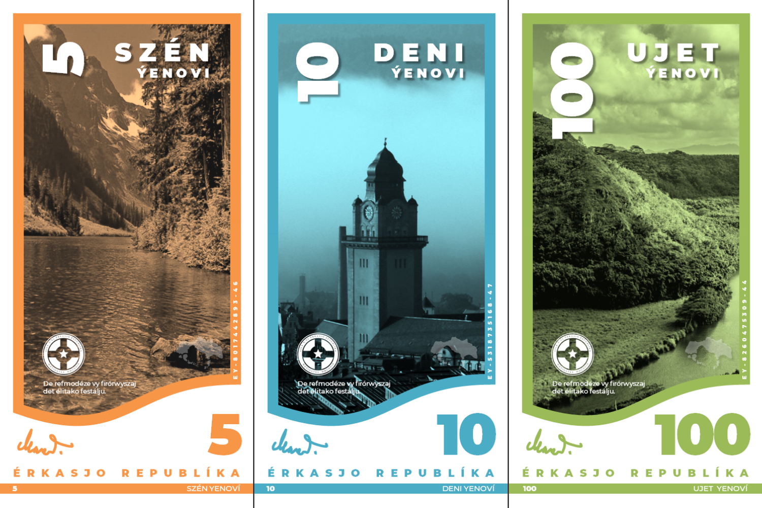 5-, 10- und 100-Yenov-Banknote, Währung der virtuellen Nation Erkassien